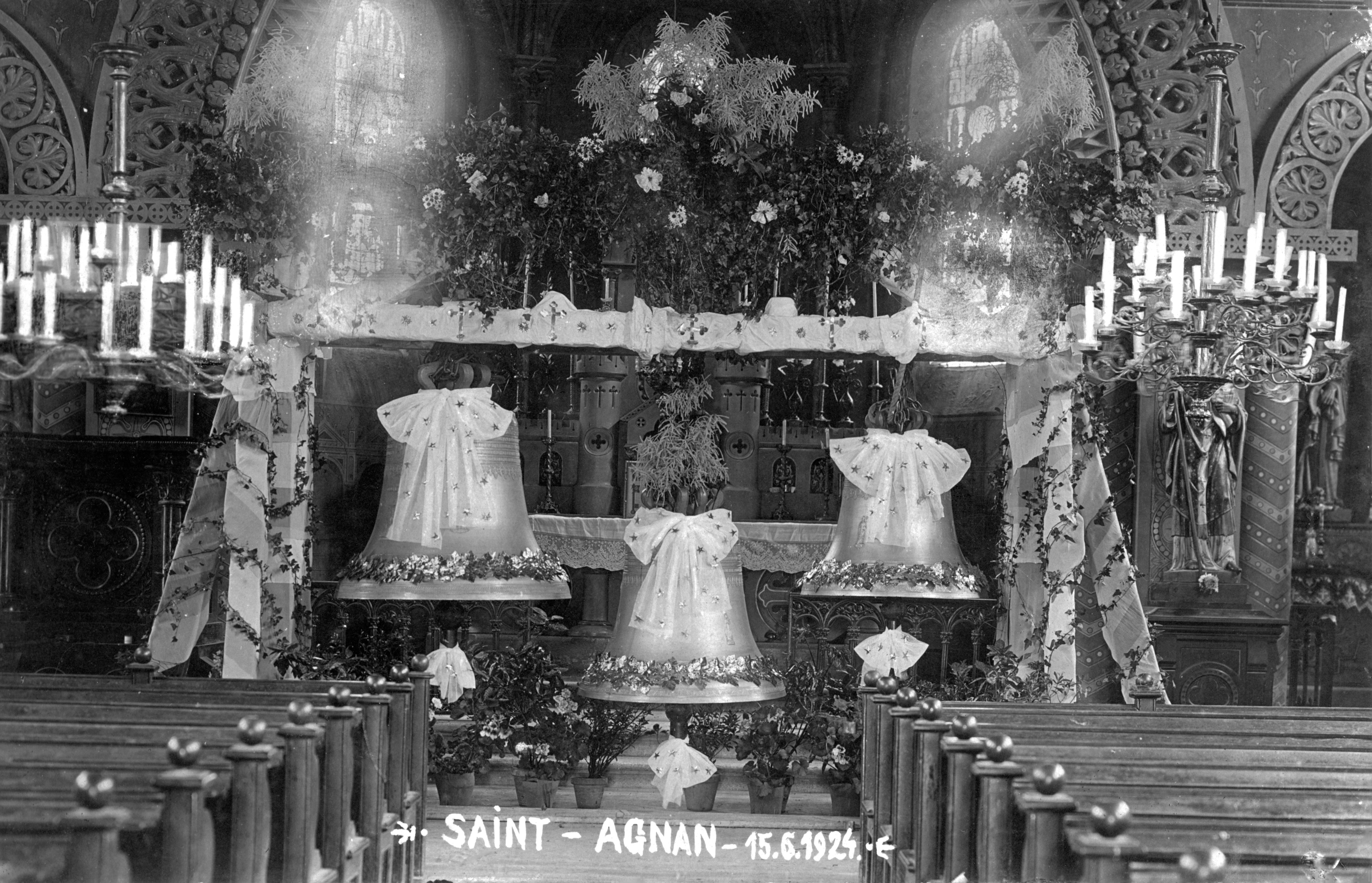 Baptême des cloches de l’église de Saint-Agnan (Moselle, France) le 15 juin 1924 ; trois cloches autour de l’autel dans le chœur de l’église.